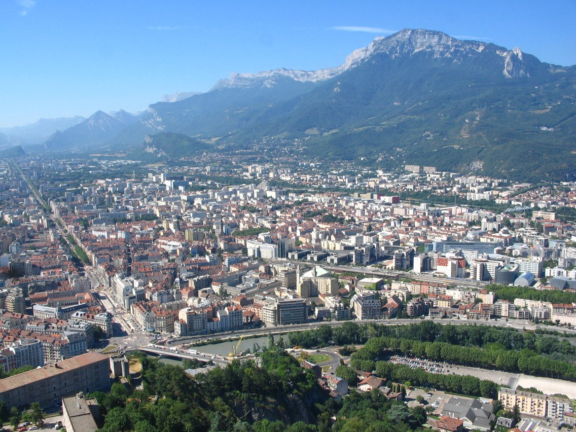 Au 1er plan, Isère et pont de la Porte de France, cours J. Jaurès (ex-N75) filant sur la gauche, plein sud vers Pont de Claix et la vallée du Drac. Derrière, quartiers ouest de Grenoble, gare, communes de Fontaine et Seyssinet-Pariset. Peu visible, la rocade ouest A480. Le tout dominé par la masse imposante du Moucherotte, ses 1 901 m et les premiers contreforts du Vercors.